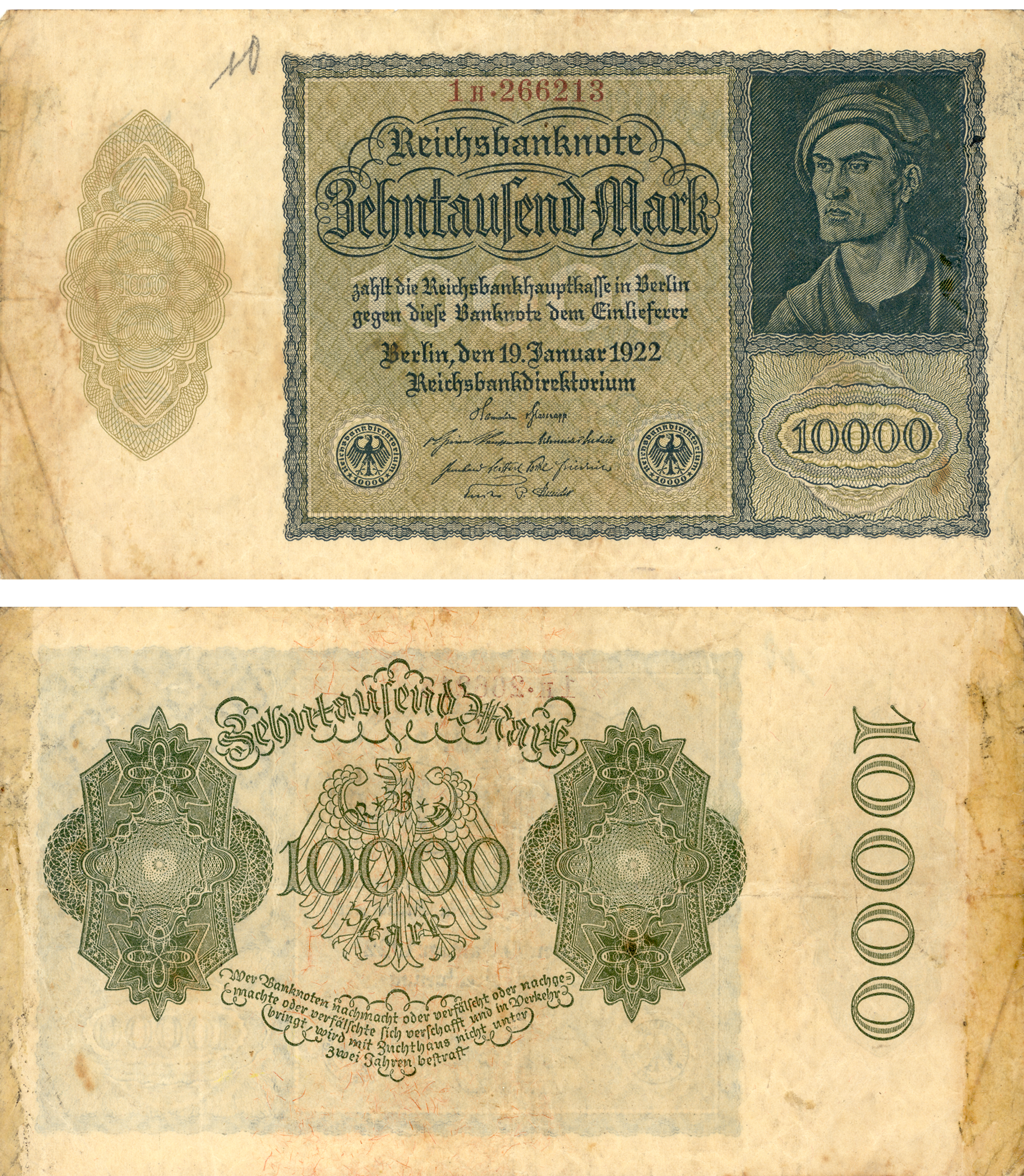 10000 Mark, Banknote von Januar 1922